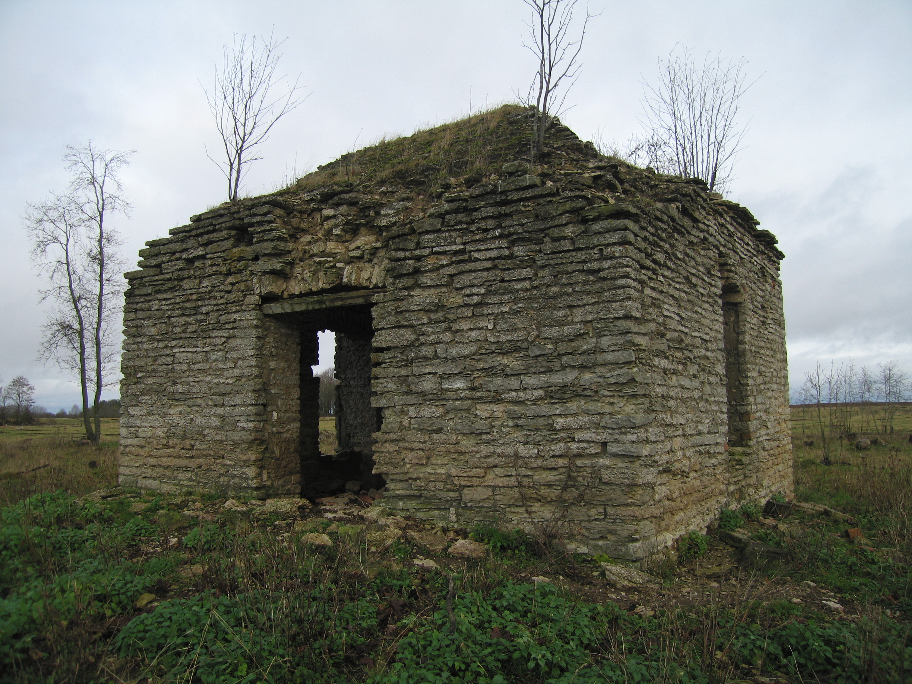 Kabel kalmistul